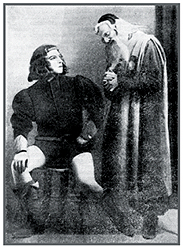 Альбер — А. Боначич, Ростовщик — С. Барсуков. Большой театр, 1906